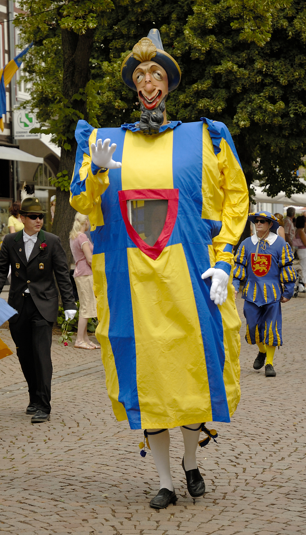 "Anreischke", das Wahrzeichen Duderstadts (Eichsfeld). Foto von Oliver Thiele auf dem Schuetzenumzug 2006